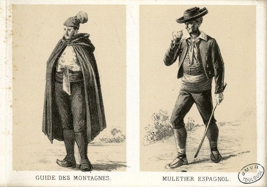 Album dépliant de 12 planches, portant 24 costumes, version abrégée de "50 costumes des Pyrénées" de Ch. Maurice qui a paru vers 1850. Ancely, René (1876 - 1966). Possesseur